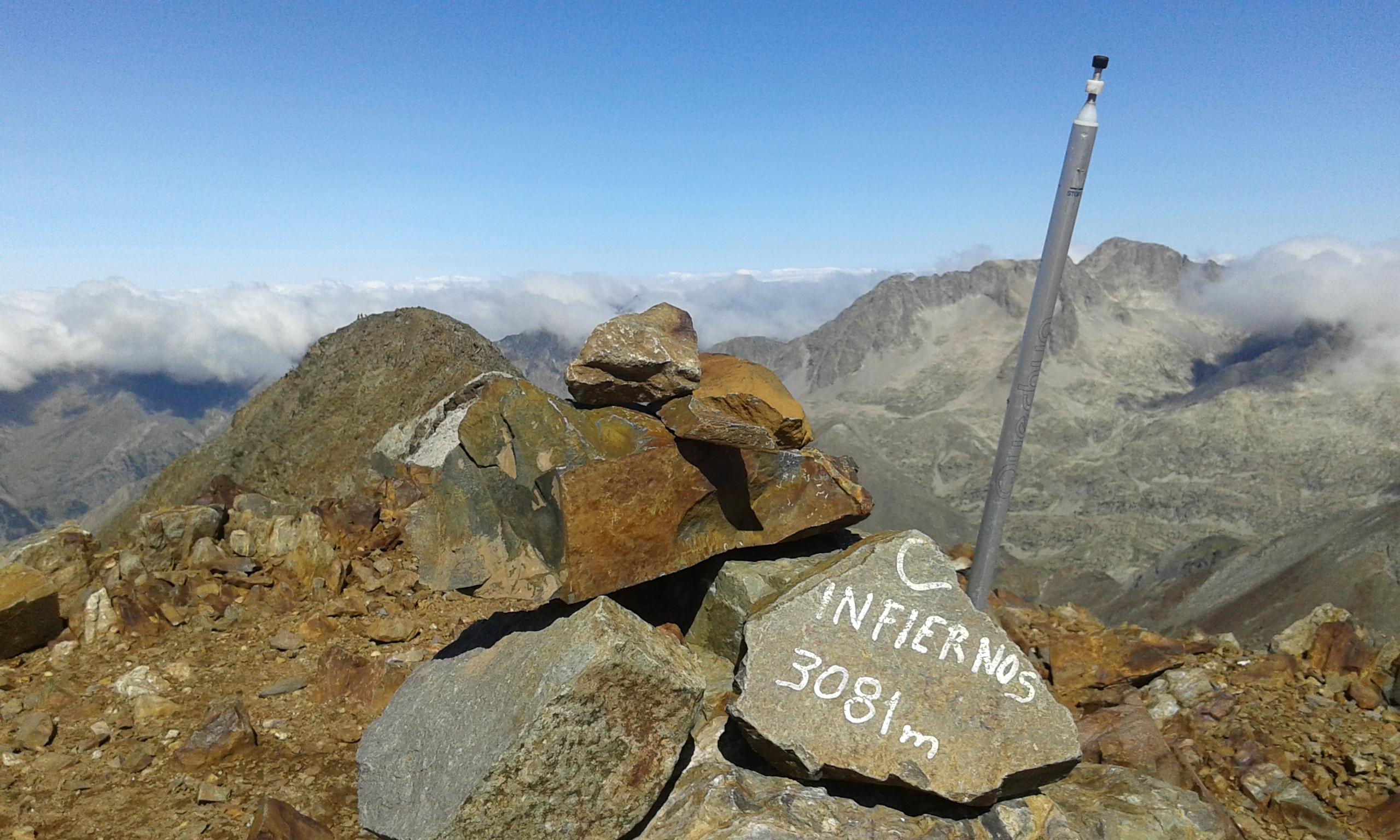 Infierno Central